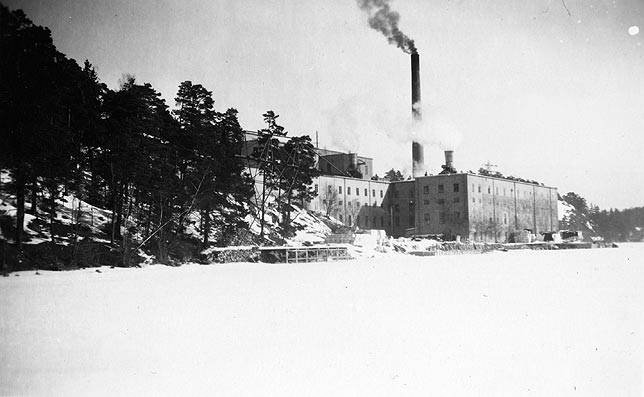 Tollare pappersbruk sett från vattnet.